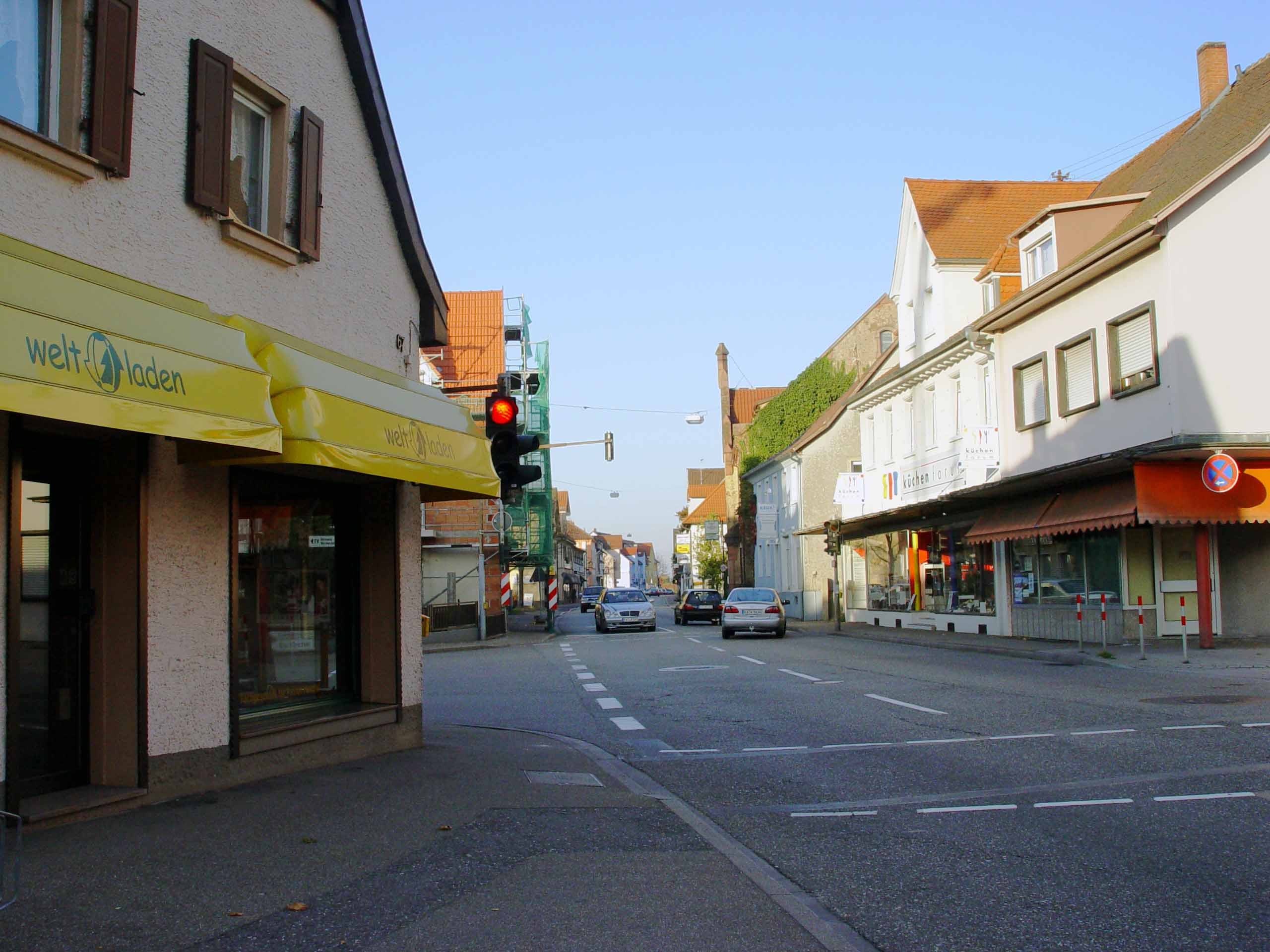 Fotografiert von Martin Dürrschnabel. Straßenbild in Durmersheim, Deutschland.